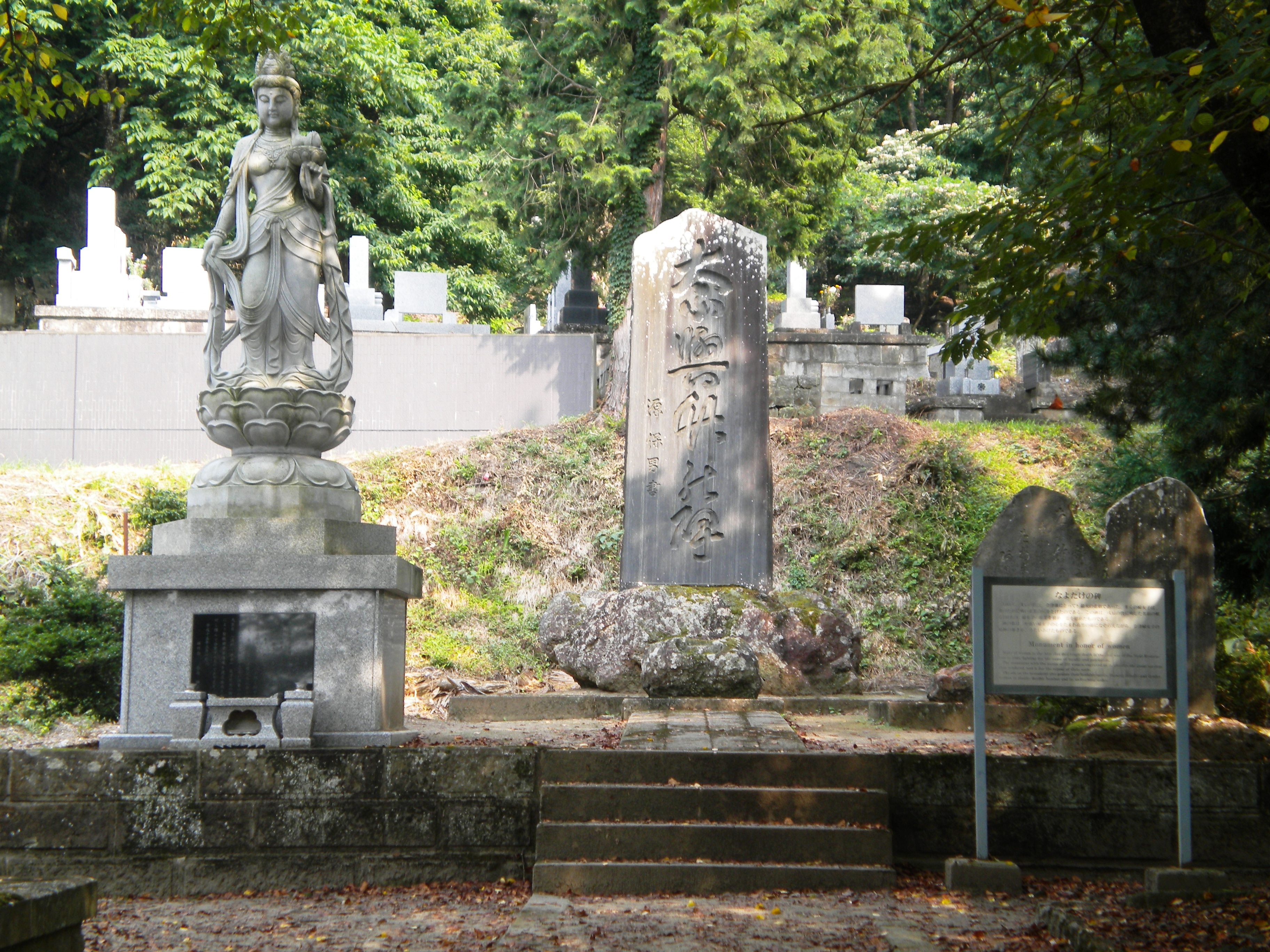 Nayotake graveston at Zenryuji }